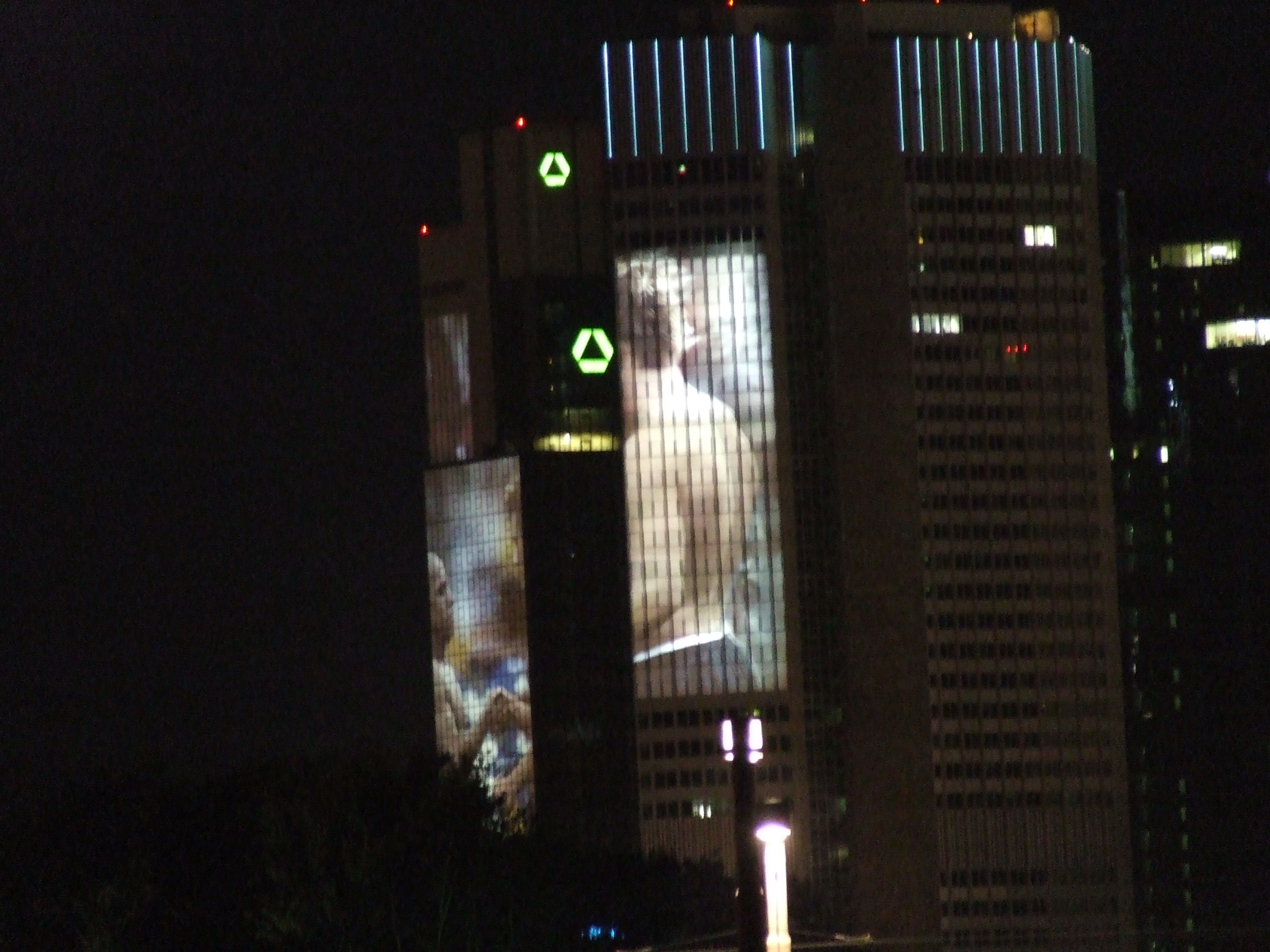 Frankfurt am Main, Mainufer, SkyArena bzw. MainArena am 4. Juni 2006